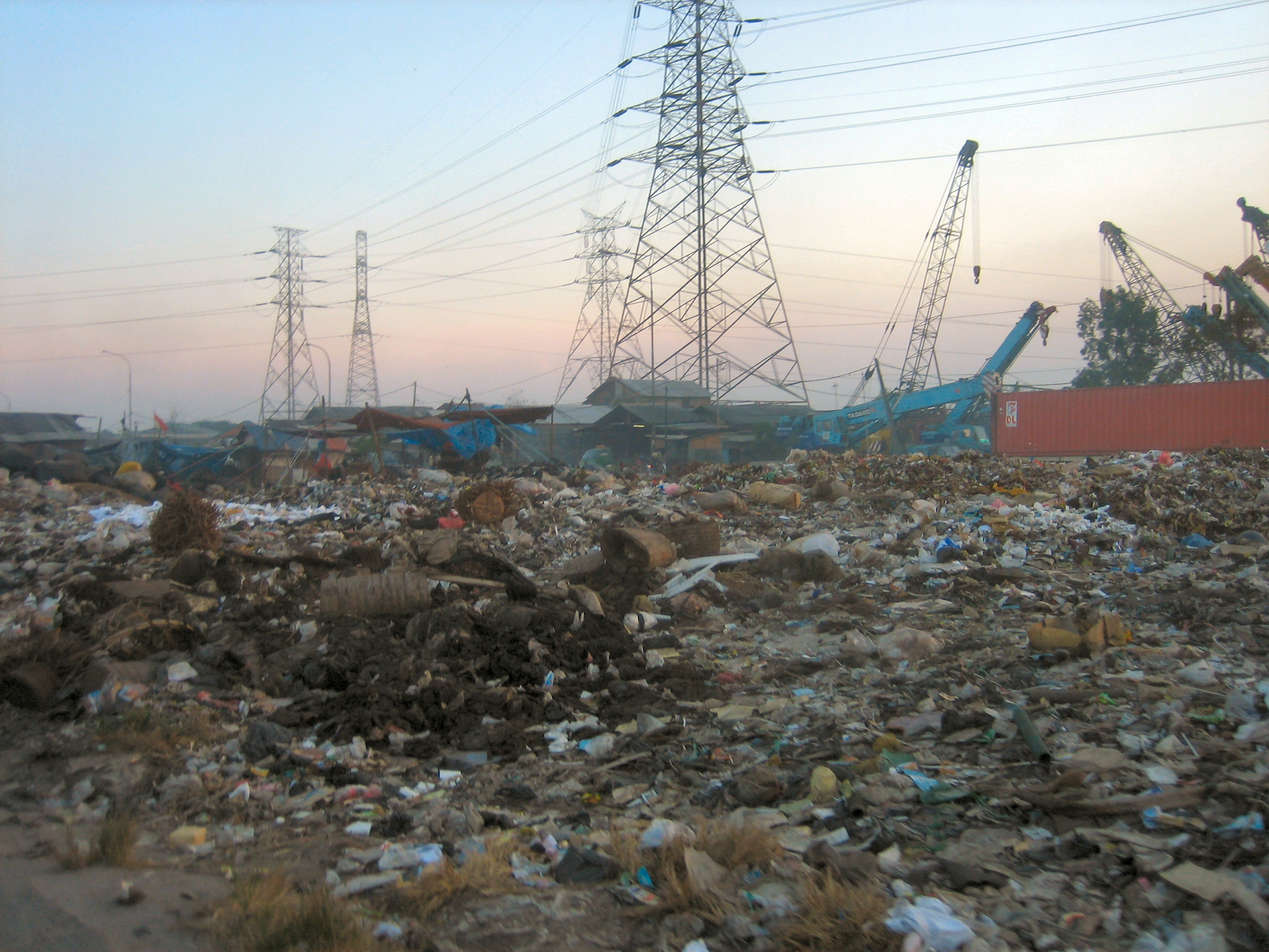 Waste dump Tanjung Priok Jakarta Indonesia Picture taken November 2006 by Hullie